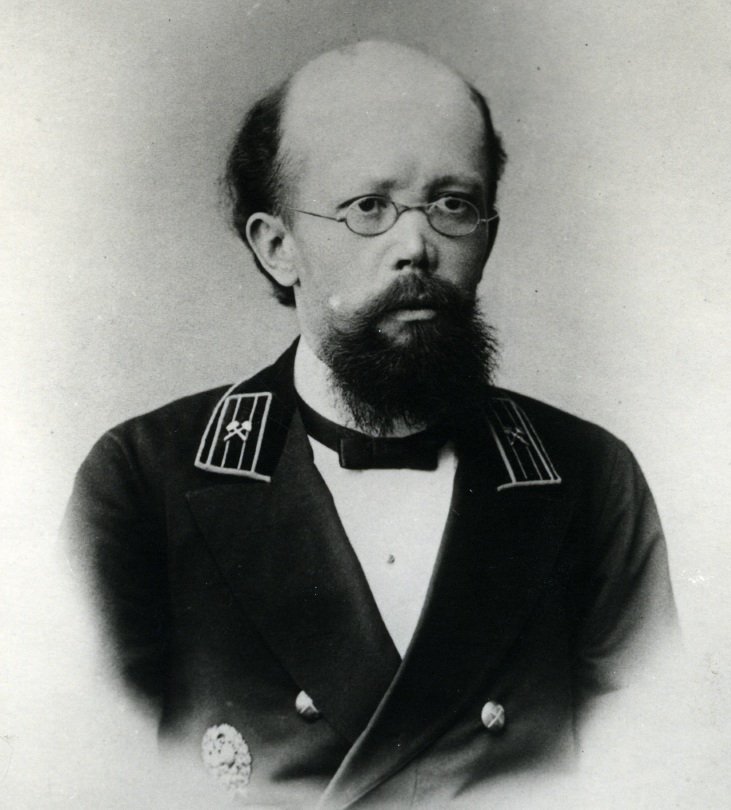 Славянов Николай Гаврилович